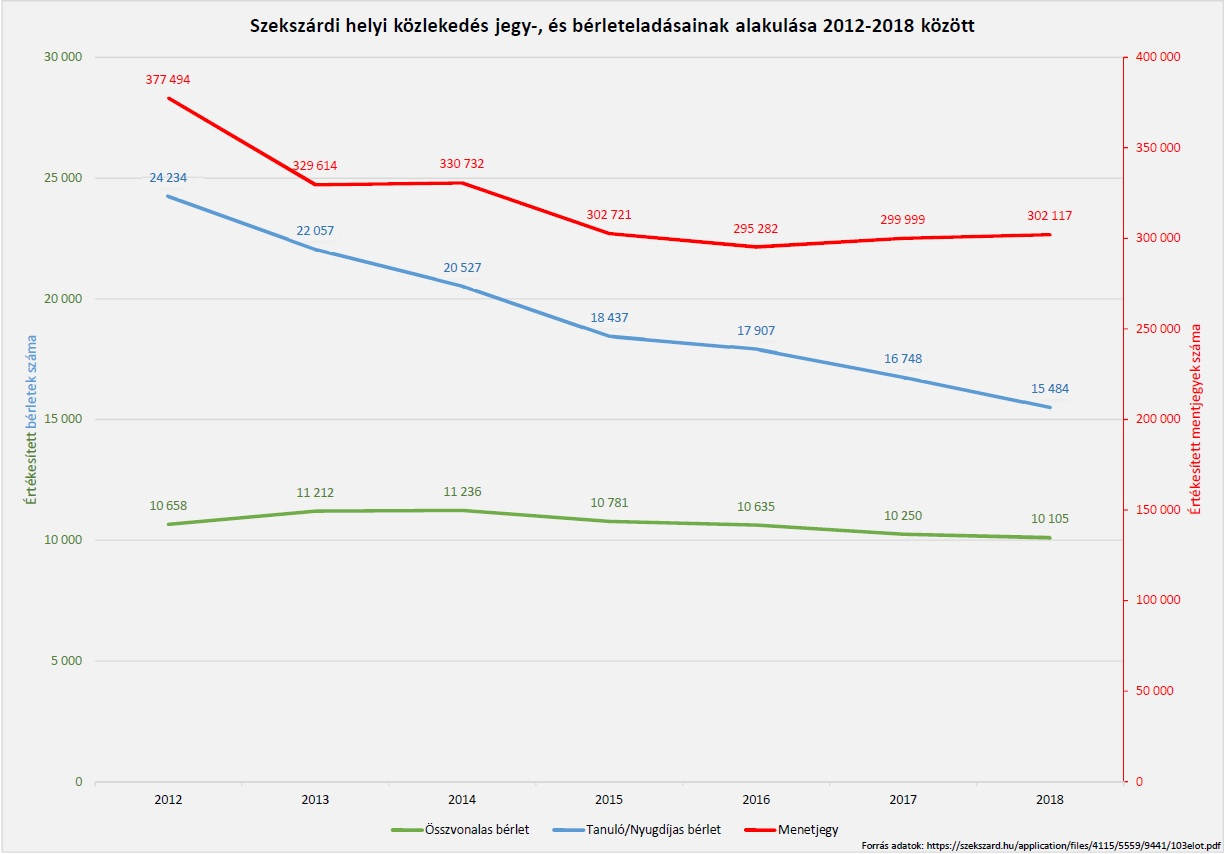 Diagram a szekszárdi helyi közösségi autóbusz közlekedésben értékesített különböző utazási igazolványok értékesítési adatairól (2012-2018)